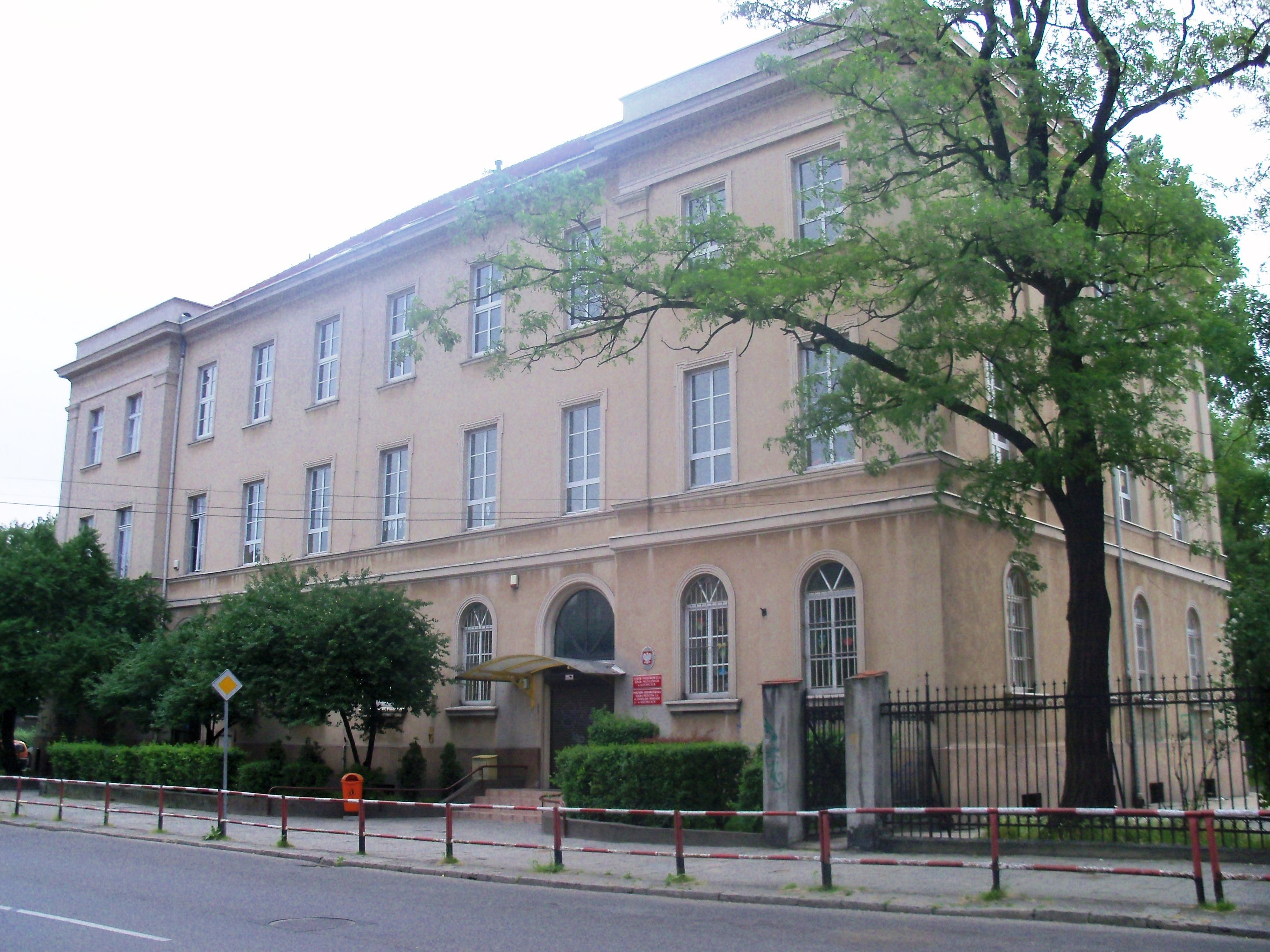 Budynek Akademii Sztuk Pięknych w Katowicach przy ul. Dąbrówki 9